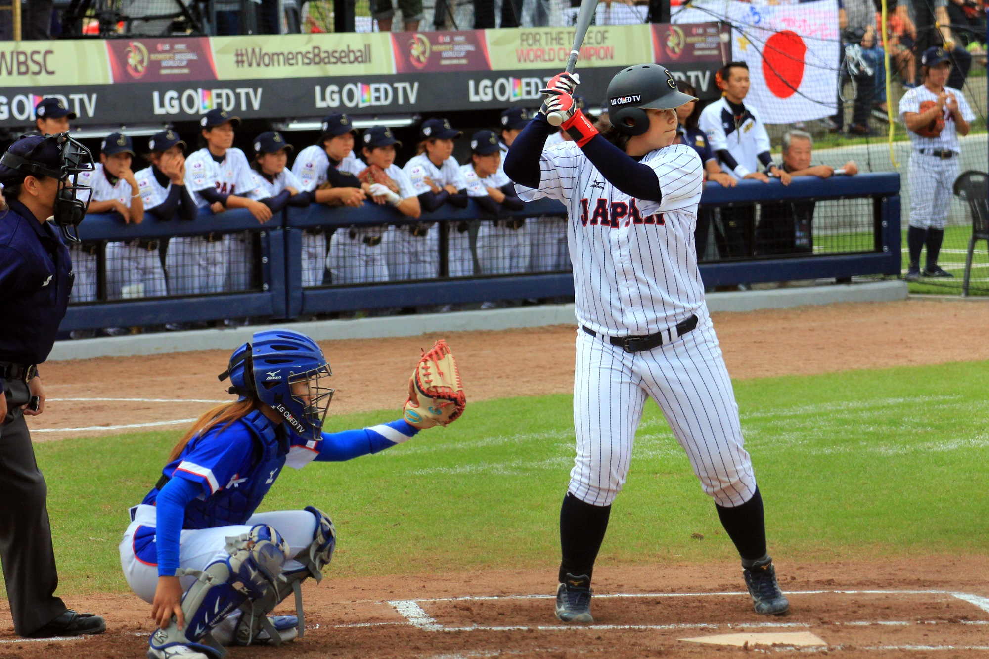 ■ 11일 부산 기장군에서 열린 ‘LG후원 WBSC 2016 기장여자야구월드컵’ 폐막 □ 11일 오후 6시 결승전을 끝으로 총 44 경기 모두 마쳐 □ 당일 결승전 직후 폐막식 개최, 성공적인 대회 마무리 자축 ■ 한국, 슈퍼라운드 진출 및 12개팀 중 6위 기록…역대 최고 성과 ■ 제 5회 ‘LG배 한국여자야구대회’ 10월 개막…LG, 여자야구 저변 확대에 지속 기여 ※ Social LG전자 ( 에서 관련 보도자료를 확인하실 수 있습니다.